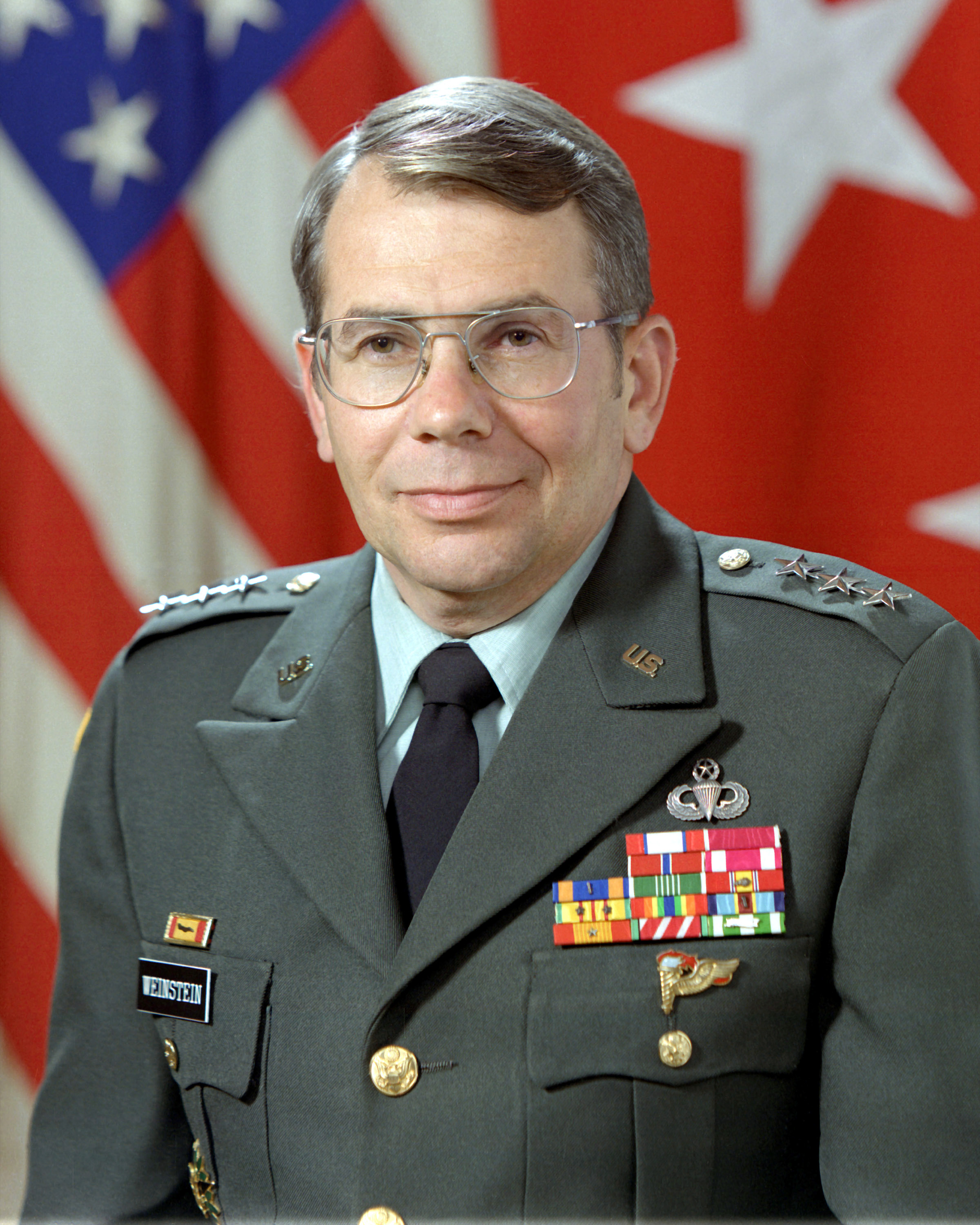 Lieutenant General Sidney T. Weinstein